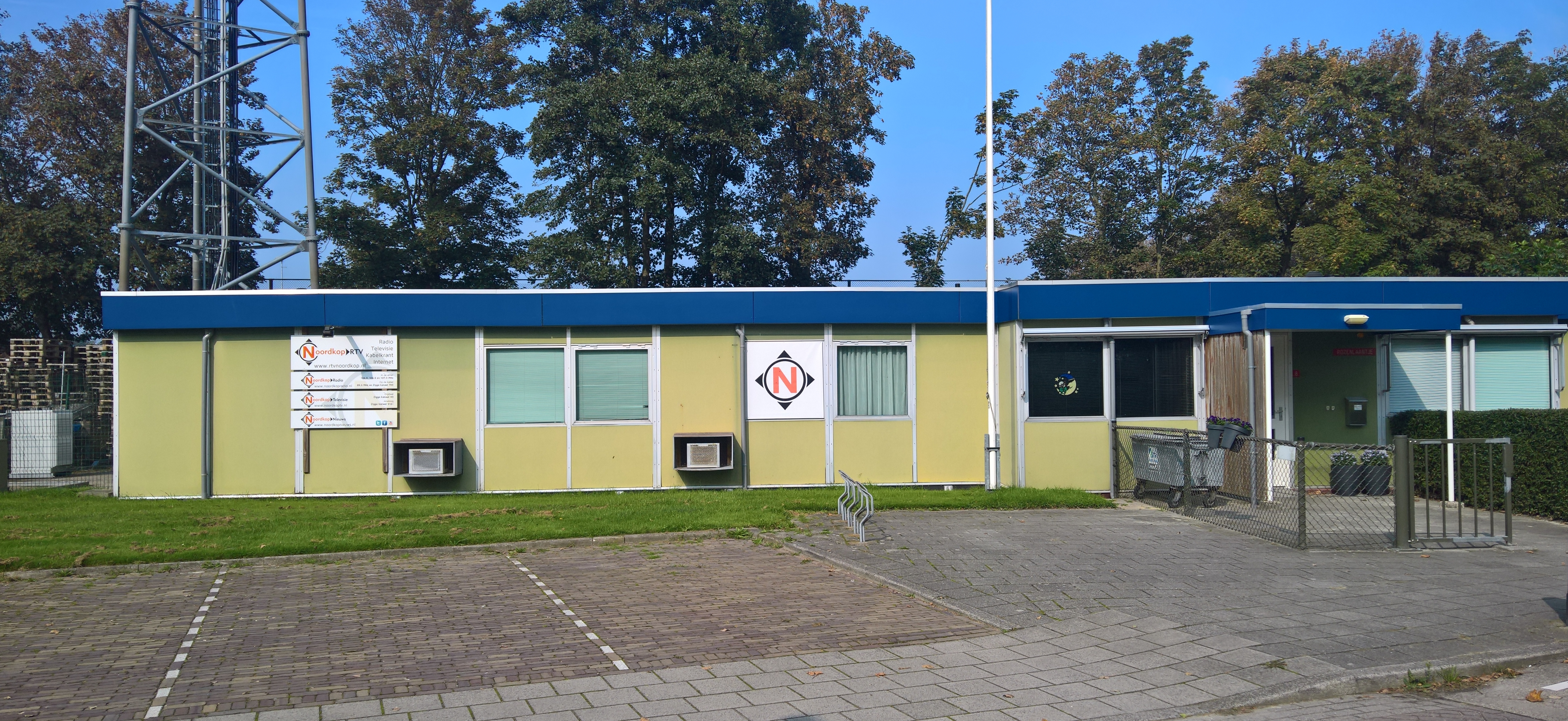 Het pand van RTV Noordkop aan het Rozenlaantje in Hippolytushoef.